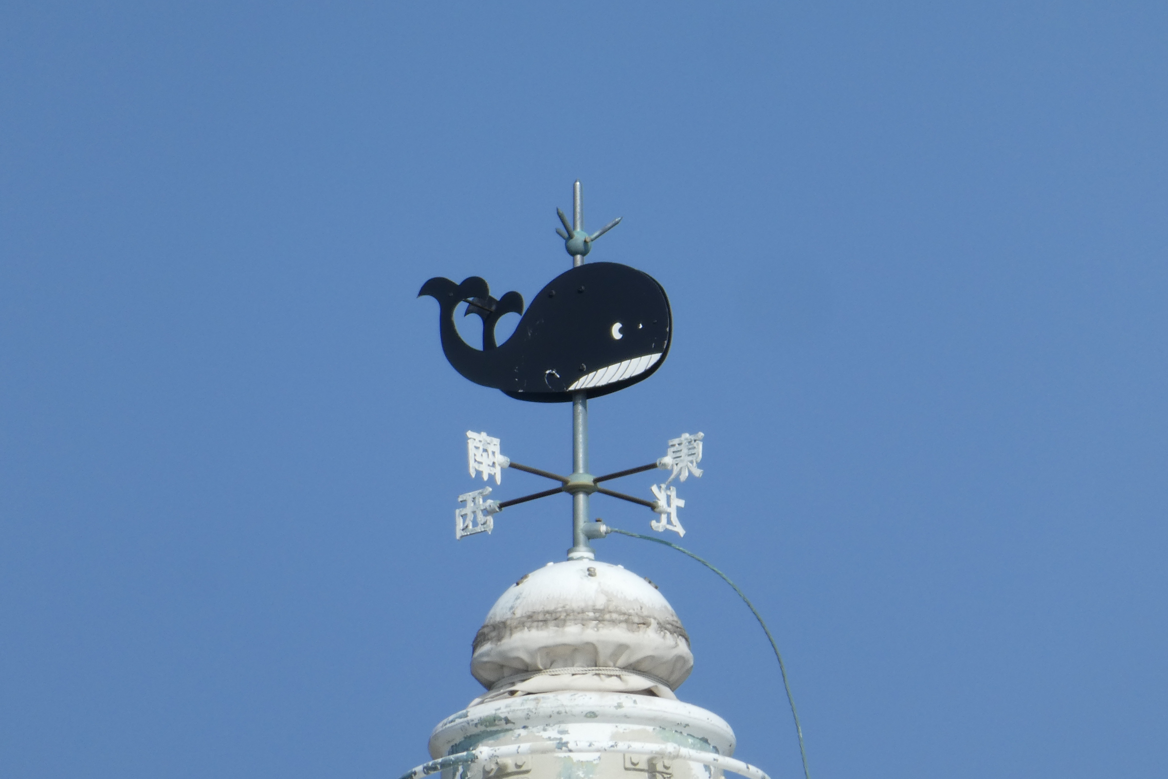 梶取埼灯台の風見鯨